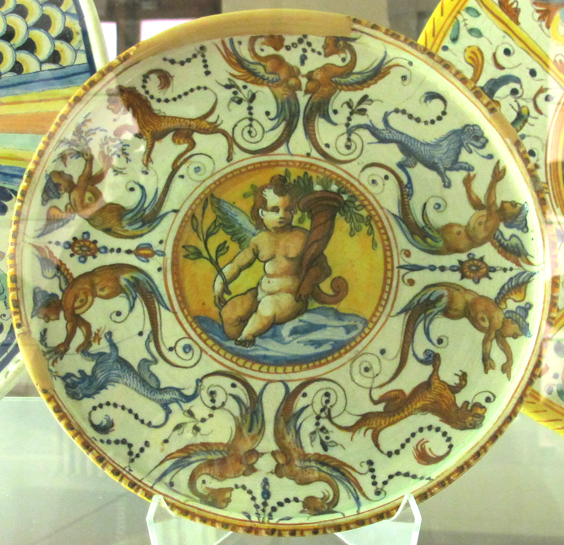 Museo Nazionale d'Arte Medievale e Moderna - MIBAC This is a photo of a monument which is part of cultural heritage of Italy.